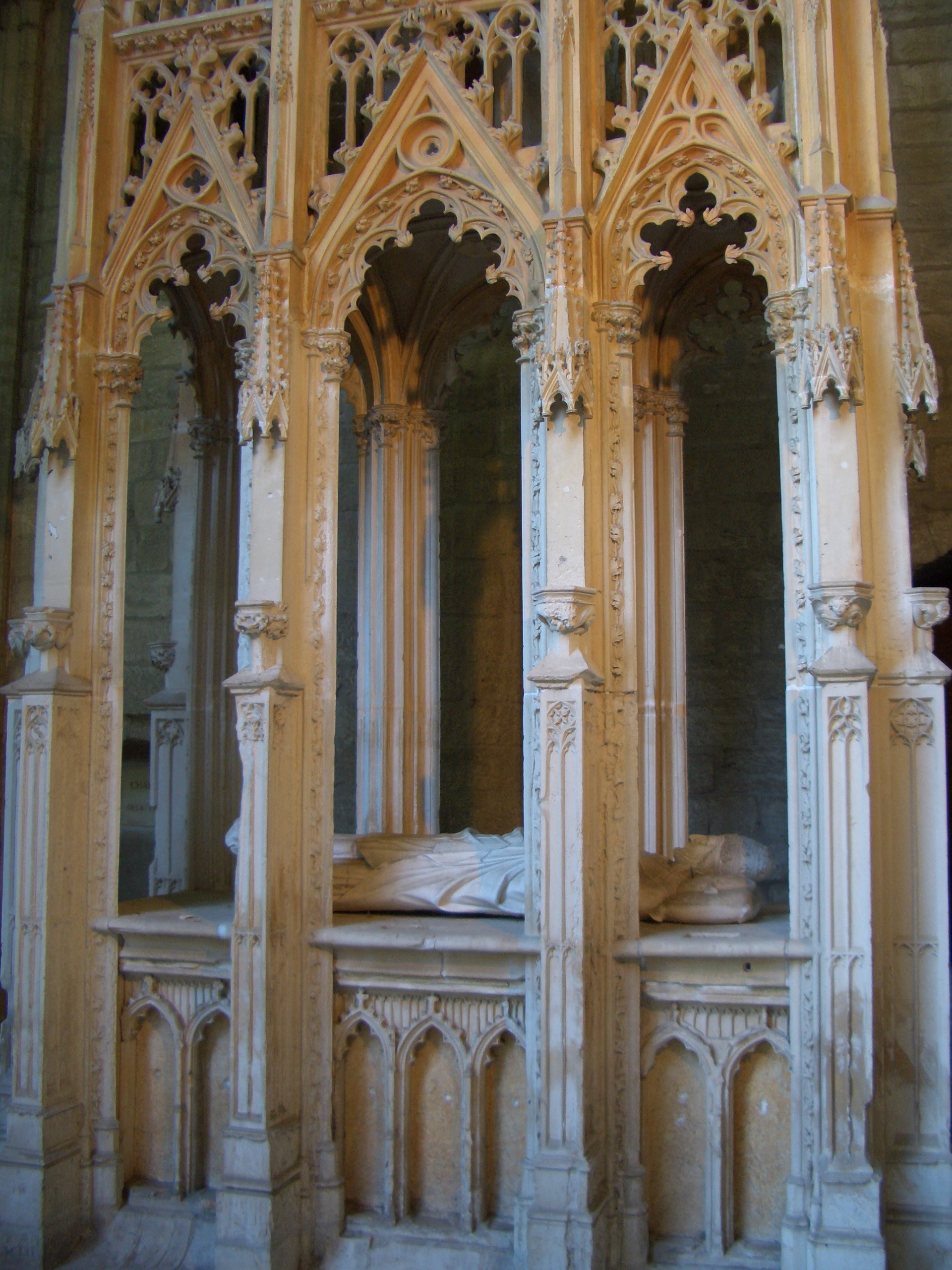 Tombeau gothique d'Innocent VI à la Chartreuse du Val-de-Bénédiction de Villeneuve-lès-Avignon